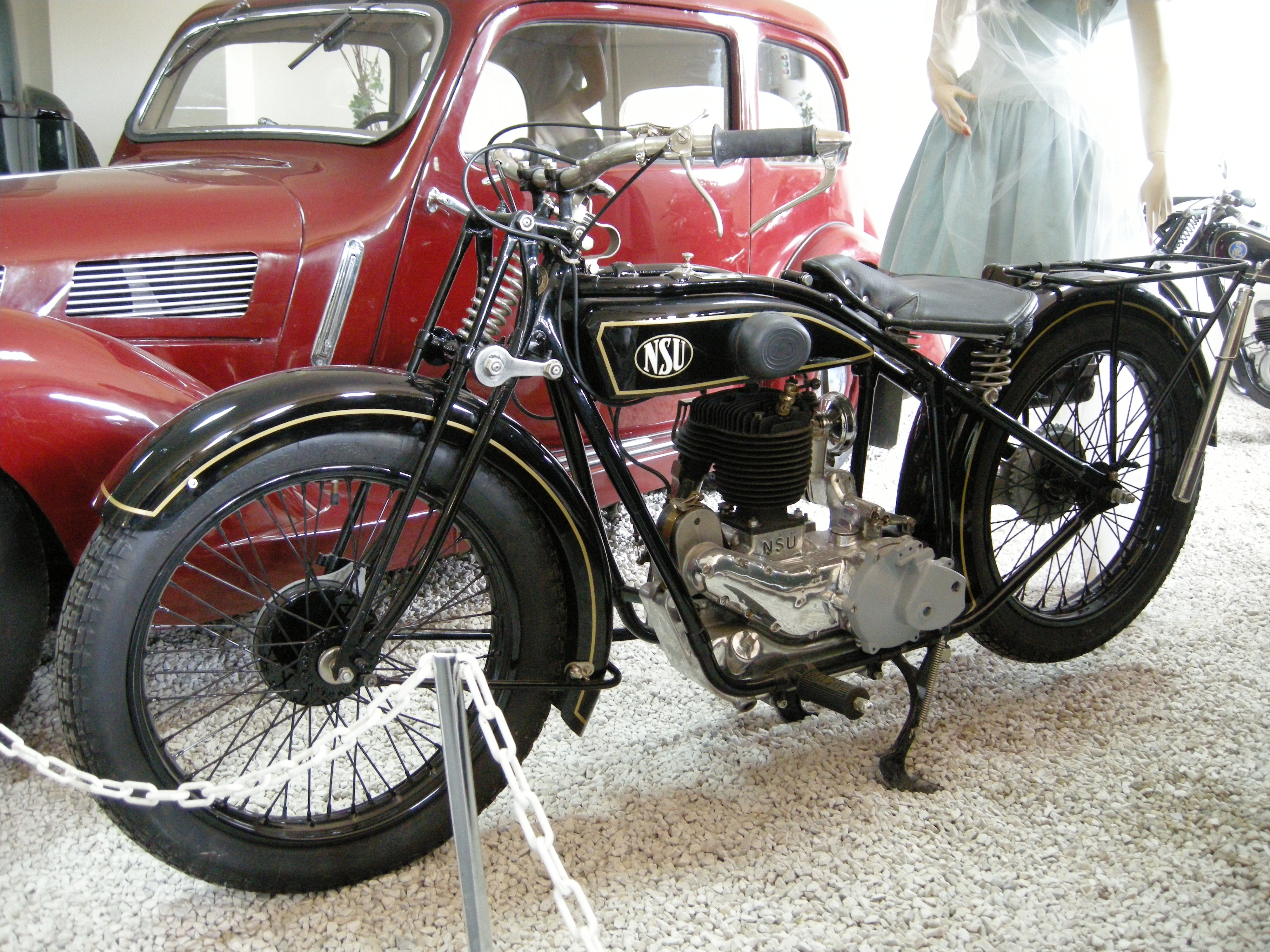 Motocykl turystyczny NSU 301 T produkcji niemieckiej z 1929 roku.